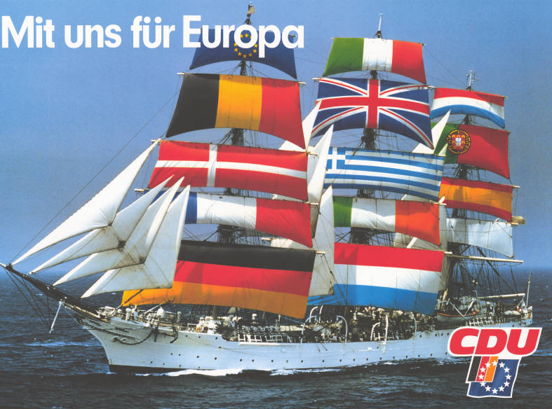 Mit uns für Europa CDU Abbildung: Europaschiff Kommentar: SS "Gorch Fock" getakelt als "EU-Liner" Vgl. Europawahlplakat Nr. 10-030-100 Plakatart: Motiv-/Textplakat Auftraggeber: CDU-Bundesgeschäftsstelle, Konrad-Adenauer-Haus, Bonn Objekt-Signatur: 10-031 : 50215 Bestand: CDU-Plakate (10-031) GliederungBestand10-18: CDU-Plakate (10-031) » Jubiläen » Posterset Lizenz: KAS/ACDP 10-031 : 50215 CC-BY-SA 3.0 DE